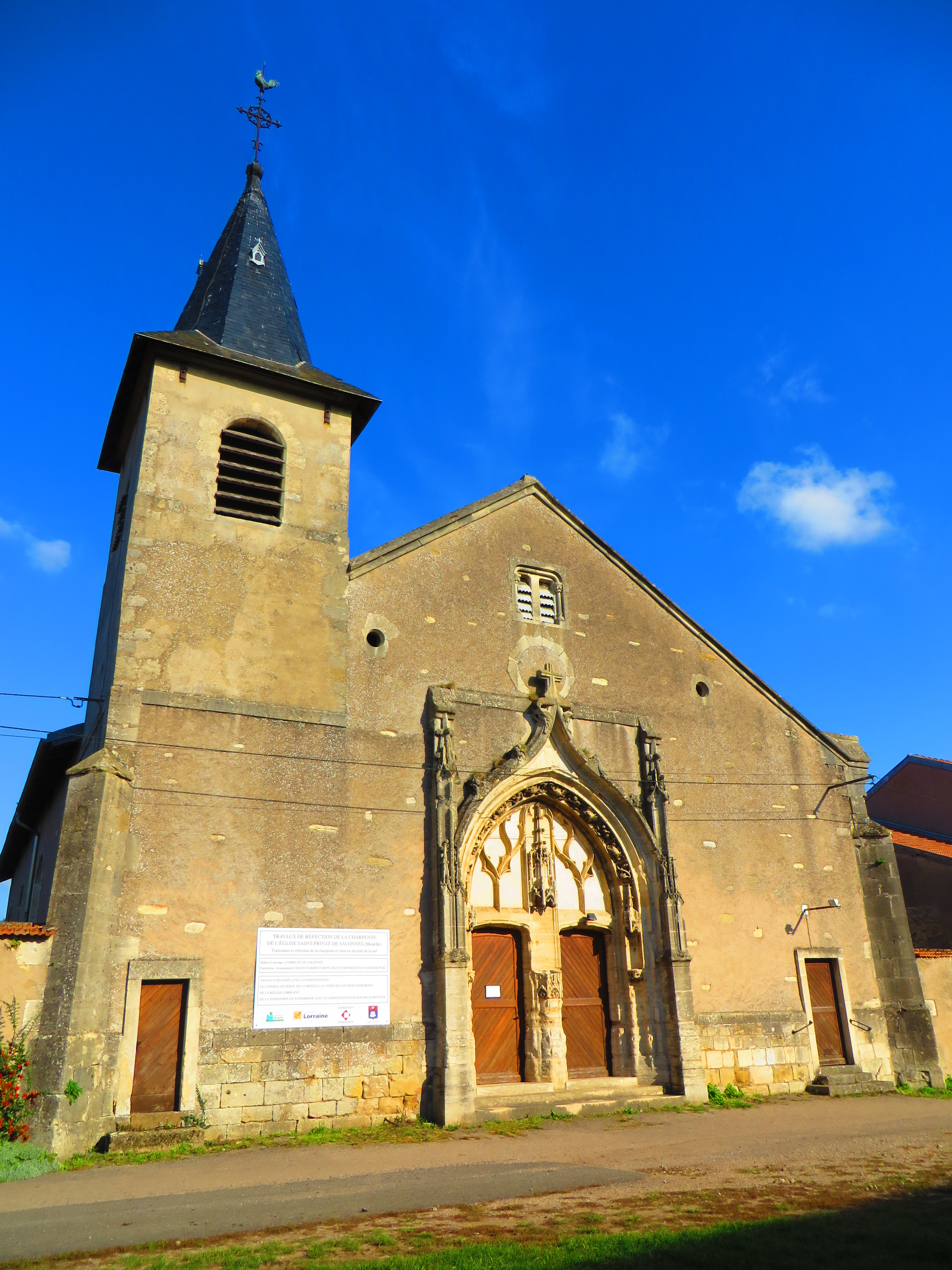 Salonnes l'église Saint-Privat